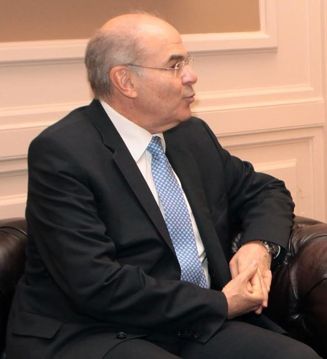 Vassilios Skouris découpé de cette photo File:Vassilios Skouris and Dimitris Avramopoulos 2013.jpg